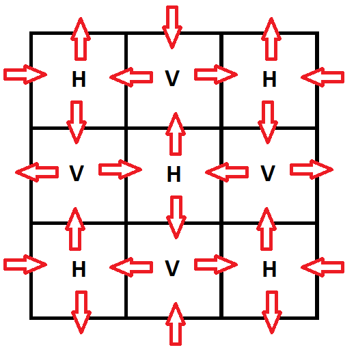 Clasificación de las celdas de una grilla bidimensional según la dirección de entrada y salida de una Hormiga de Langton moviendose sobre ella